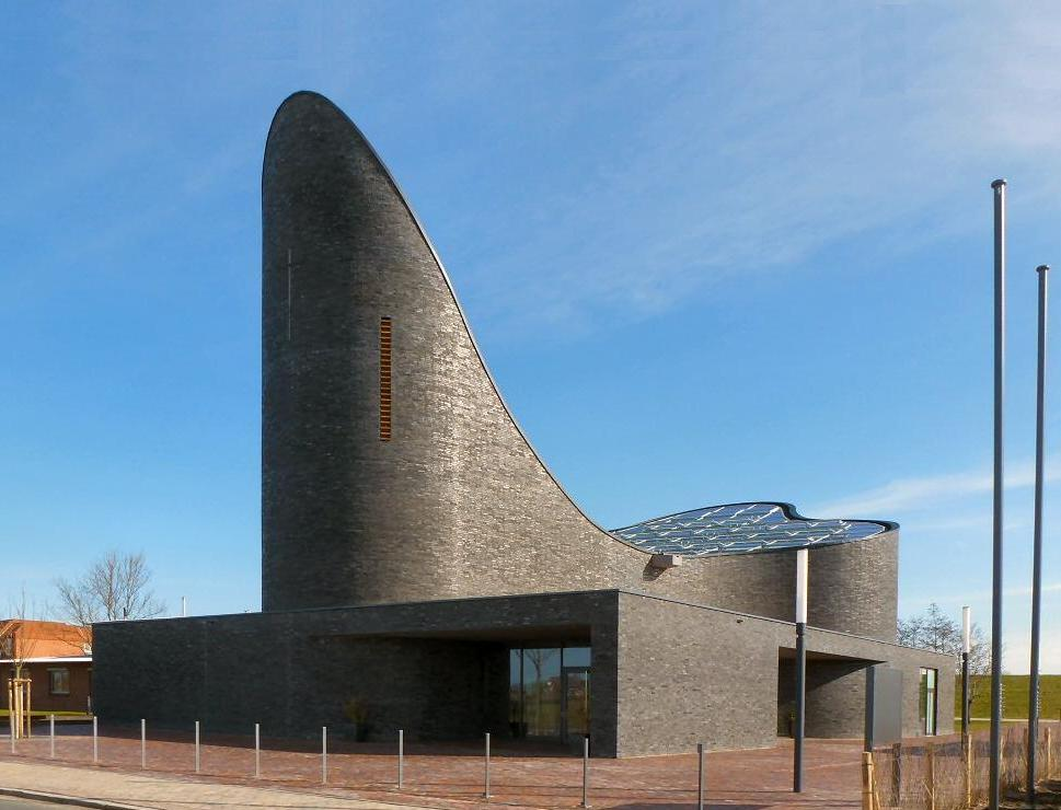 Außenansicht der katholische Kirche St. Marien in Schillig, Gemeinde Wangerland, Niedersachsen